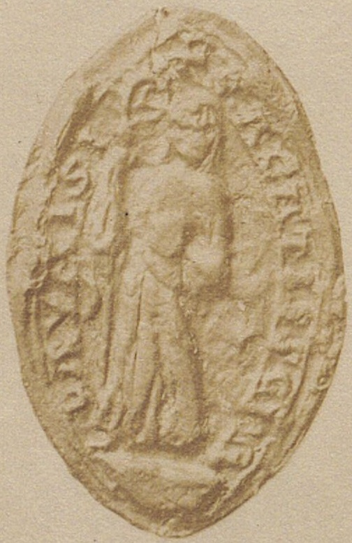 Sceau médiéval de l'abbaye cistercienne de La Vassin, en Auvergne. Reproduit dans la monographie d'Élie Jaloustre Étude historique sur l'abbaye royale de La Vassin.